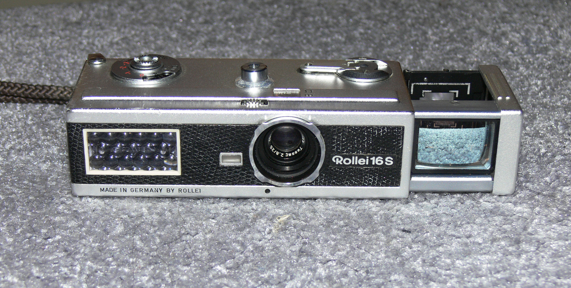 Rollei 16S snake skin 16mm subminiature camera 禄莱16S 蛇皮微型相机